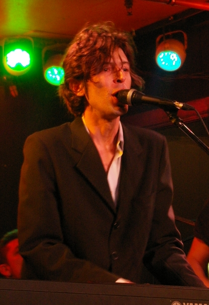 Andy Chango (concierto en Clamores)